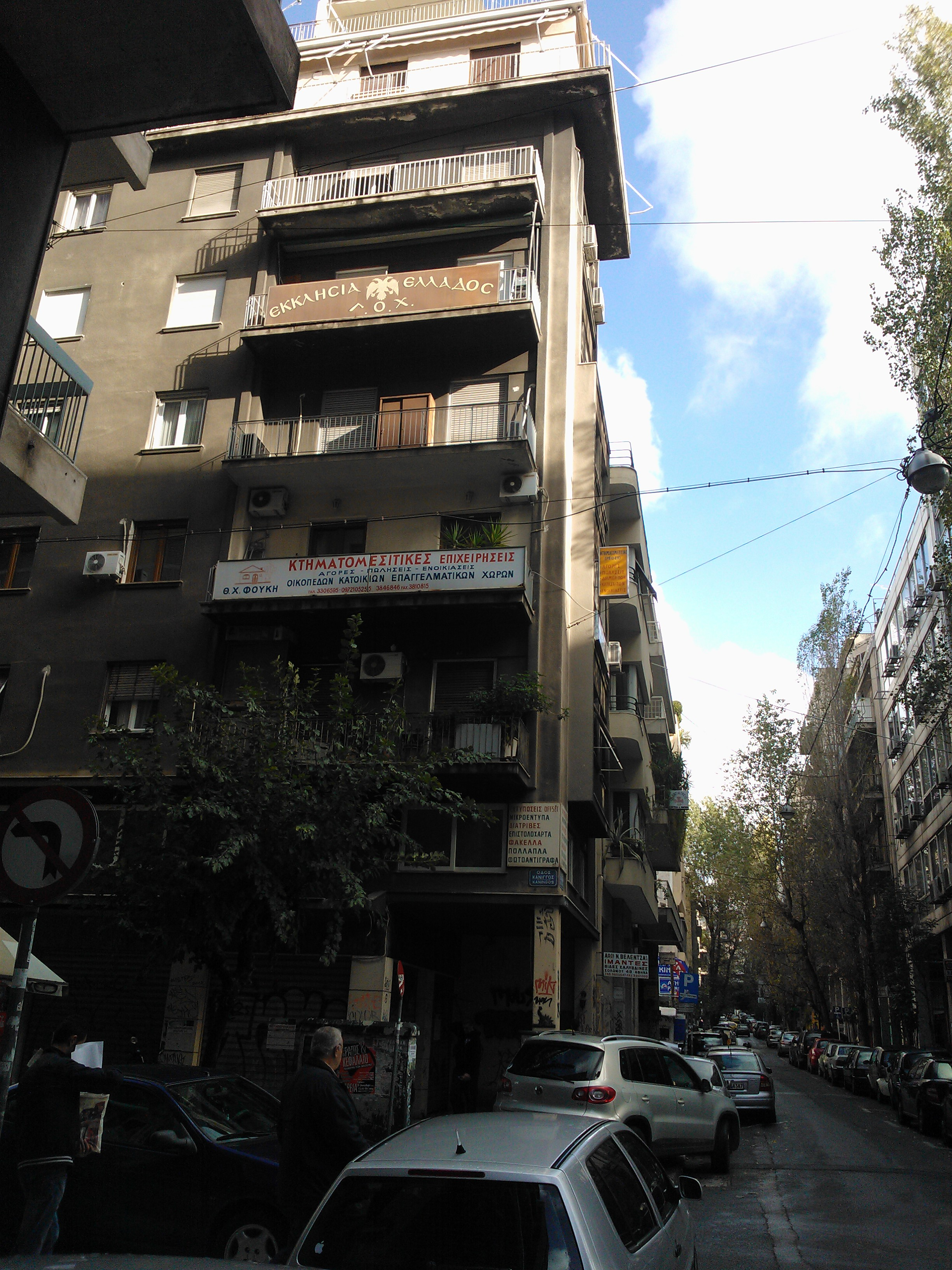 Резиденция Хризостомовского Синода в Афинах (ул. Канингос, 22)